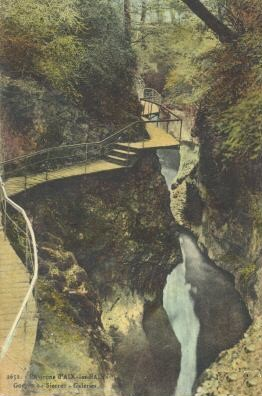 Vieille carte postale de ma collection personnelle